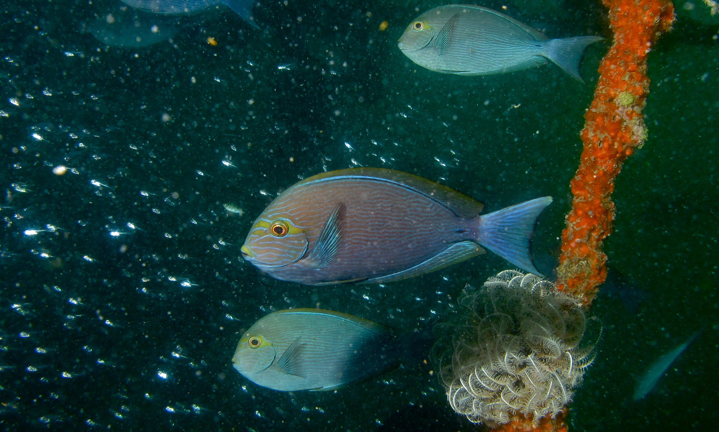 Sea Venture, Mabul, Sabah, MALAYSIA